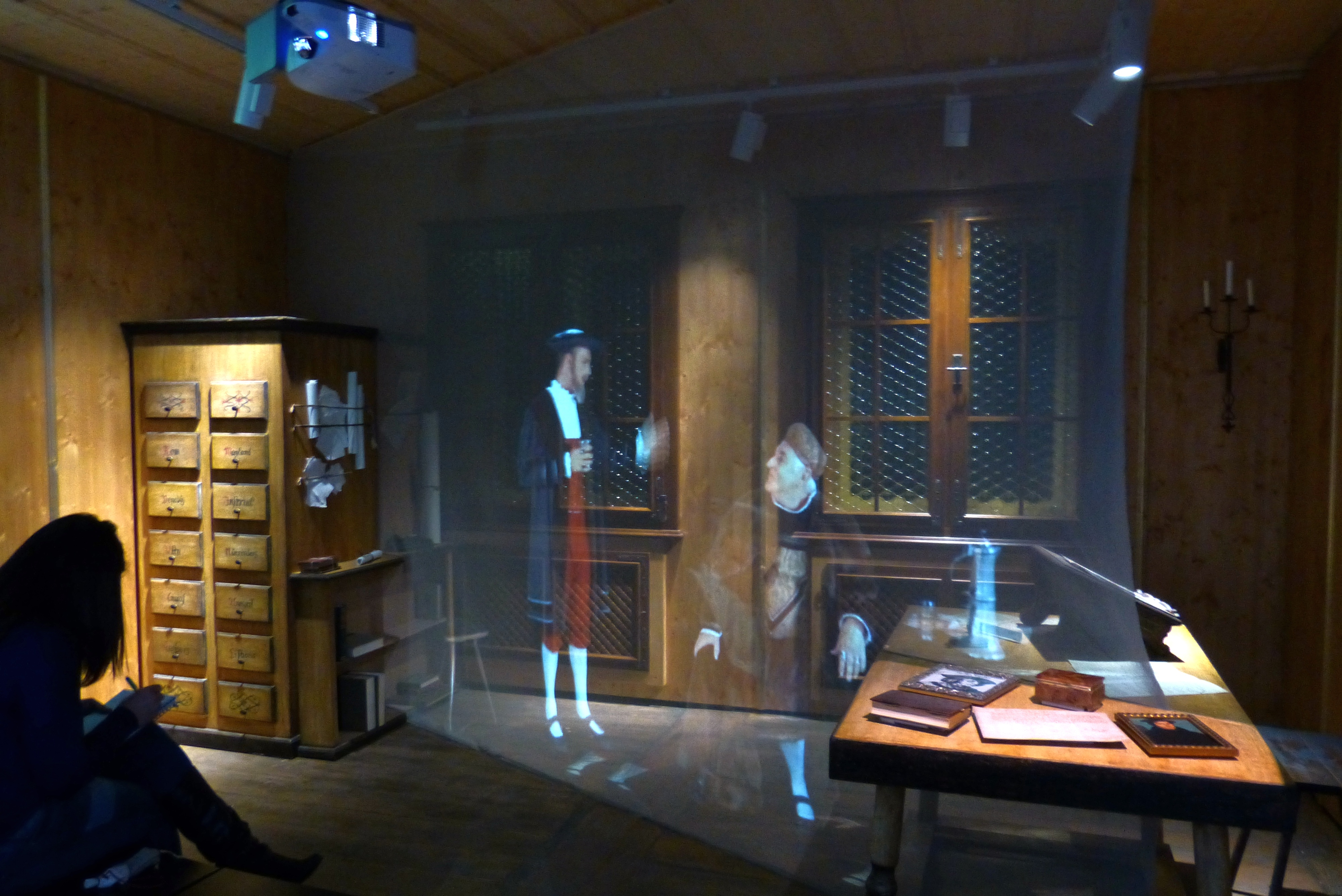 Lebensgroße, interaktive Filmprojektion im Fugger-und-Welser-Erlebnismuseum Augsburg. Sie zeigt Jakob Fugger "den Reichen" (Heinz Schulan) und Bartholomäus V. Welser (Florian Keis) in der "goldenen Schreibstube". Der Film wird mit einem Beamer auf einen konvex gewölbten Spiegel und von dort auf ein diagonal durch den Raum -- sogar mitten durch die Tischplatte -- gespanntes feines Netz projiziert. Die Figuren sprechen miteinander, stehen auf, setzen sich, und trinken. Projizierte und reale Objekte sind durchmischt.